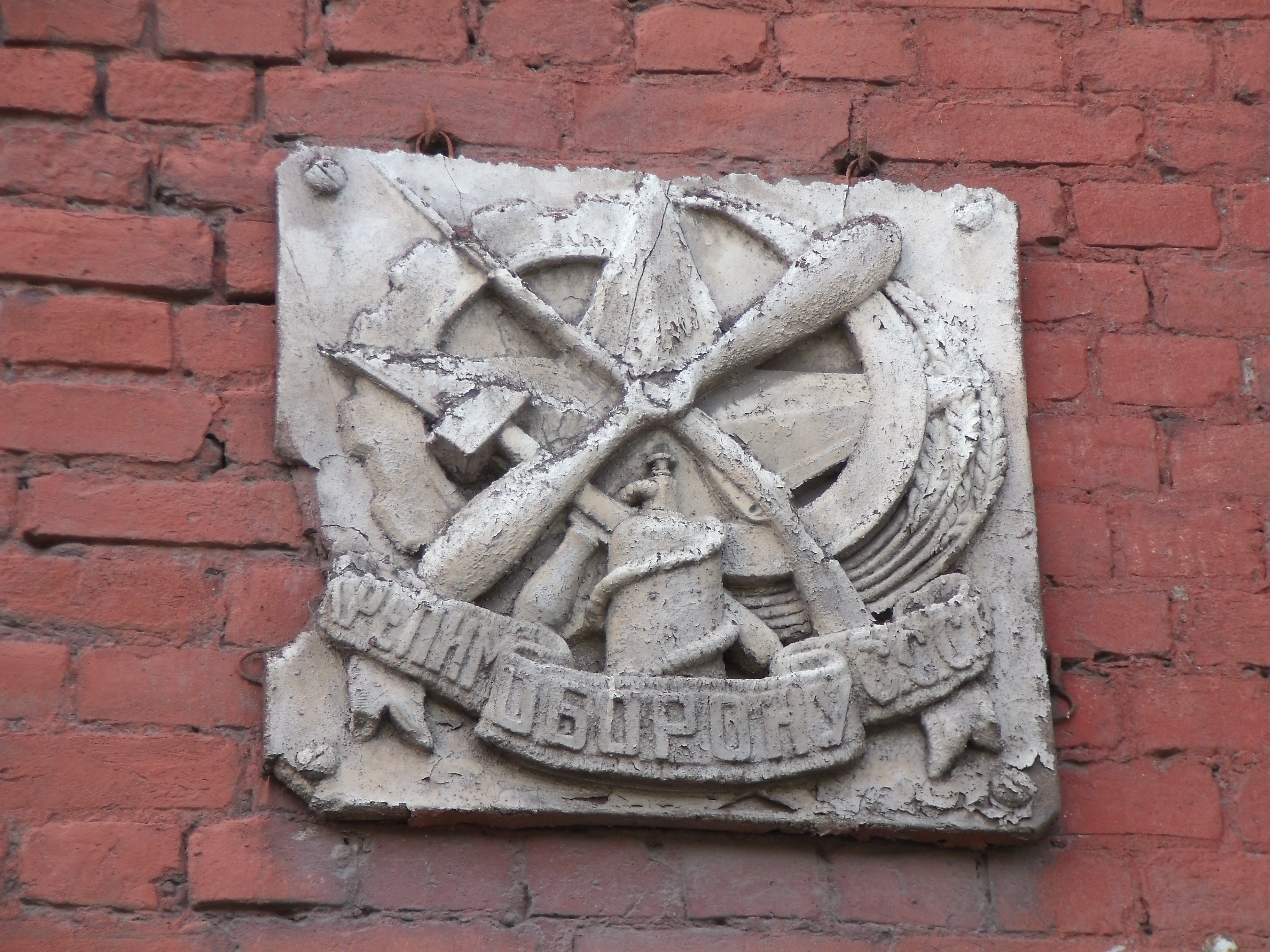 Знак «Крепим оборону СССР». Санкт-Петербург, Охотничий переулок, д. 5. [1]